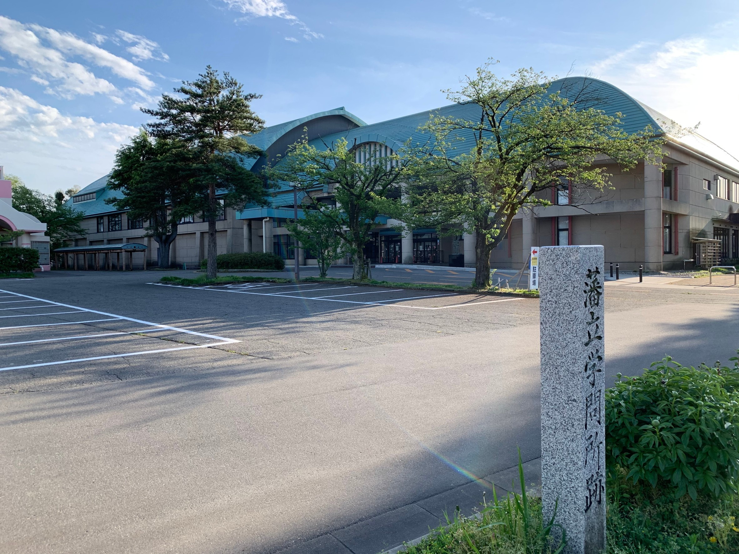 五泉市さくらんど会館と村松藩立学問所跡の碑（2020年5月）